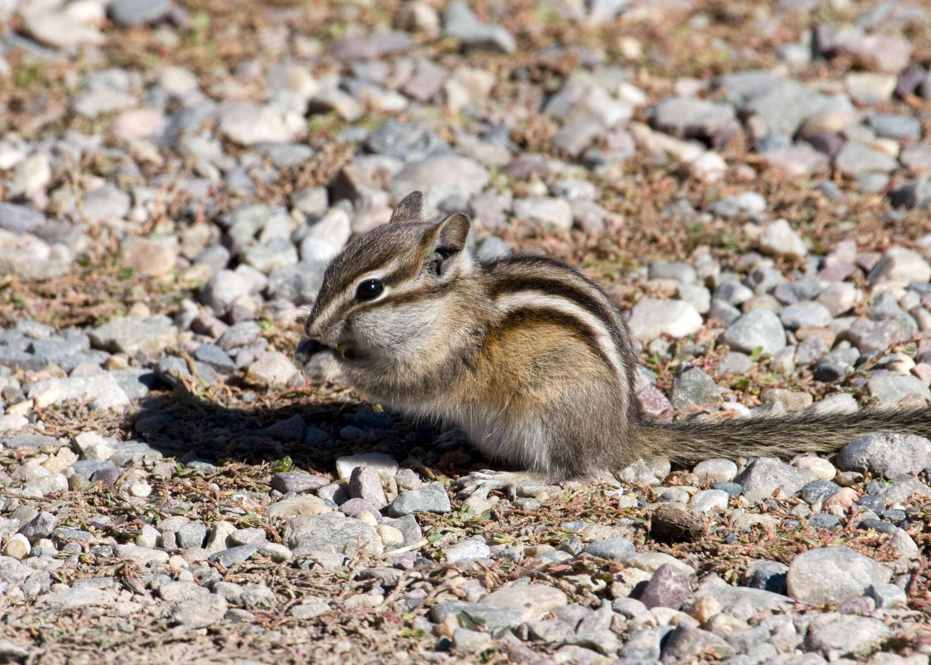 Least chipmunk, Tamias minimus